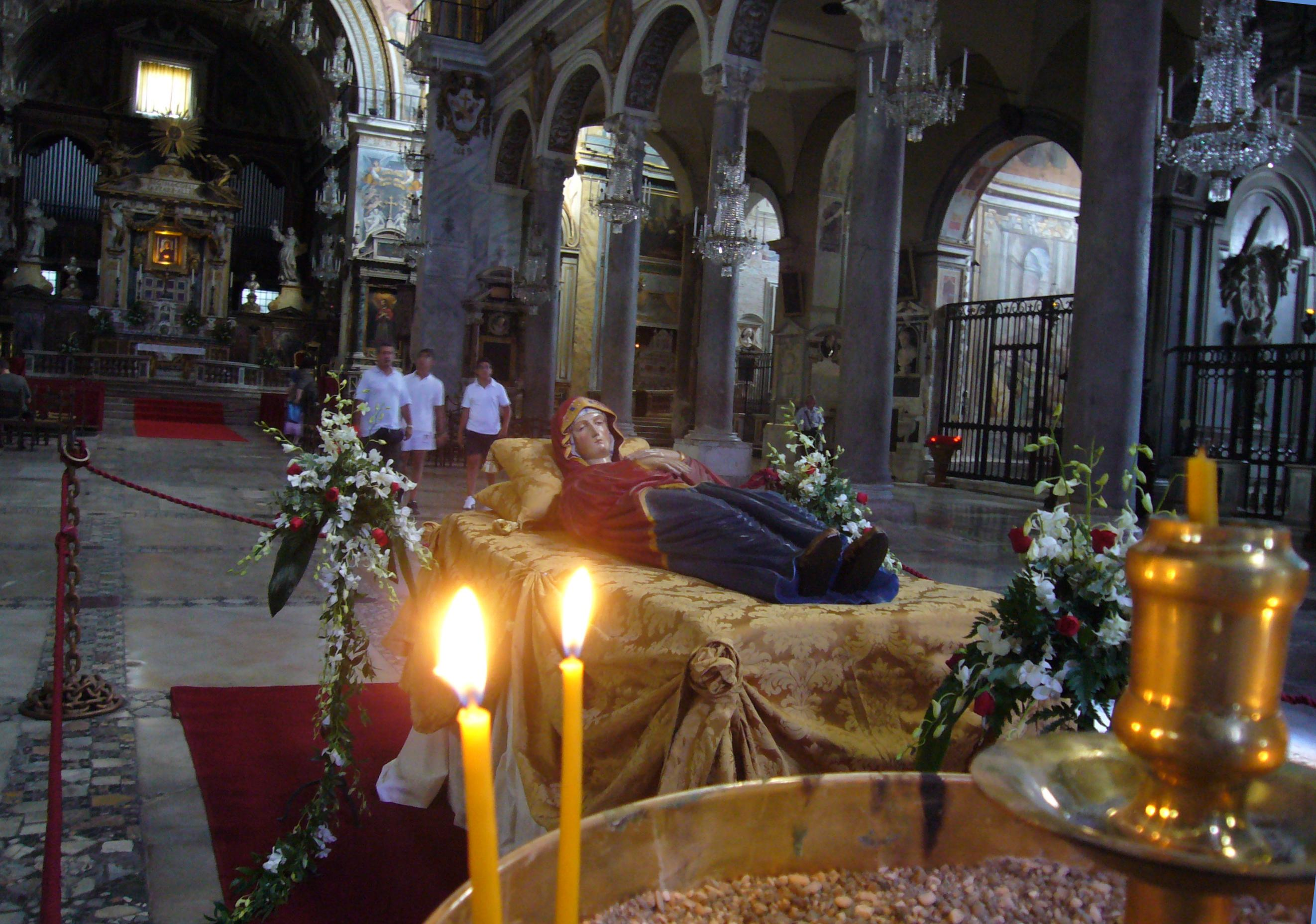 Roma, Aracoeli: Dormitio Mariae